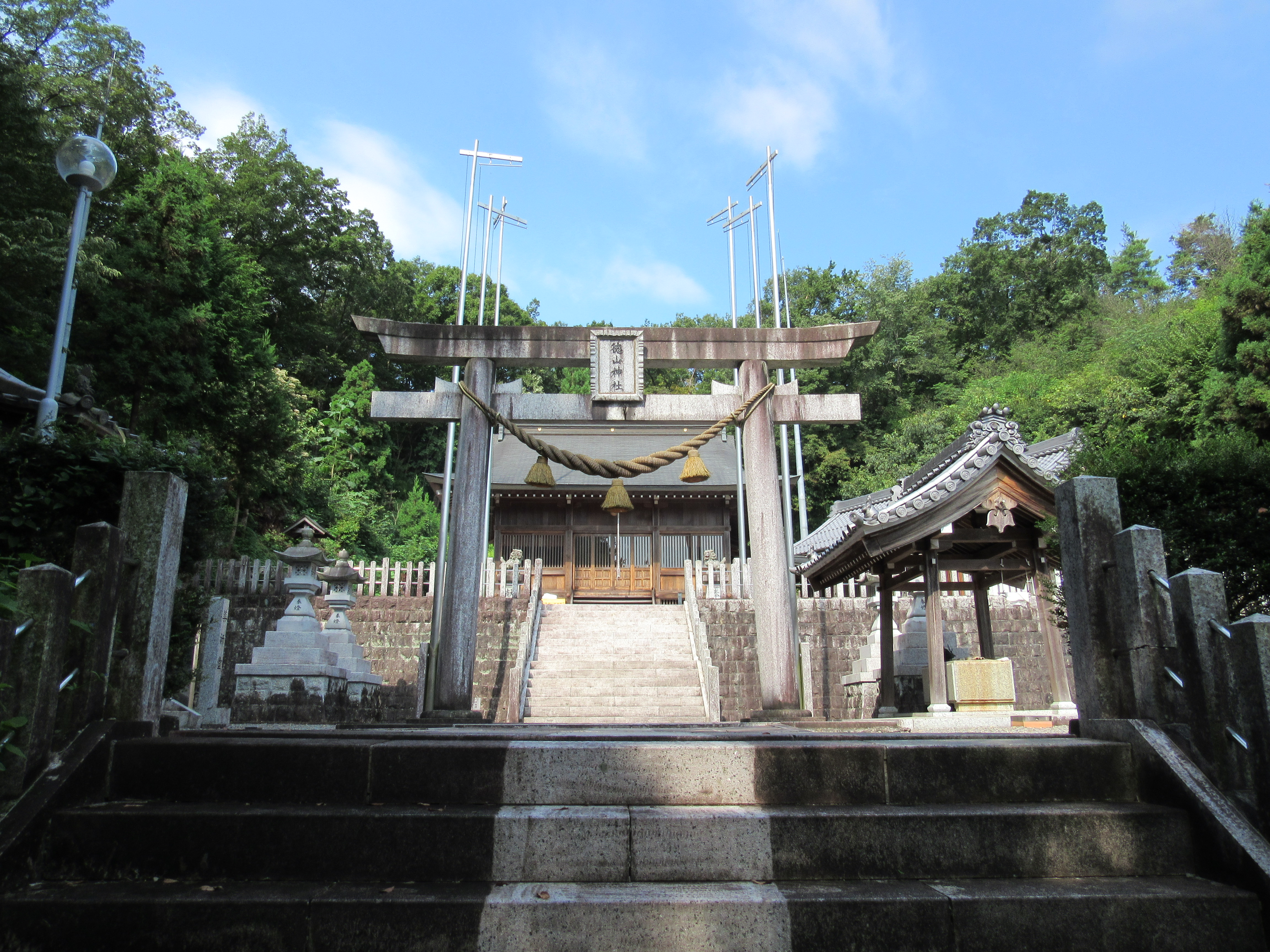 徳山神社。